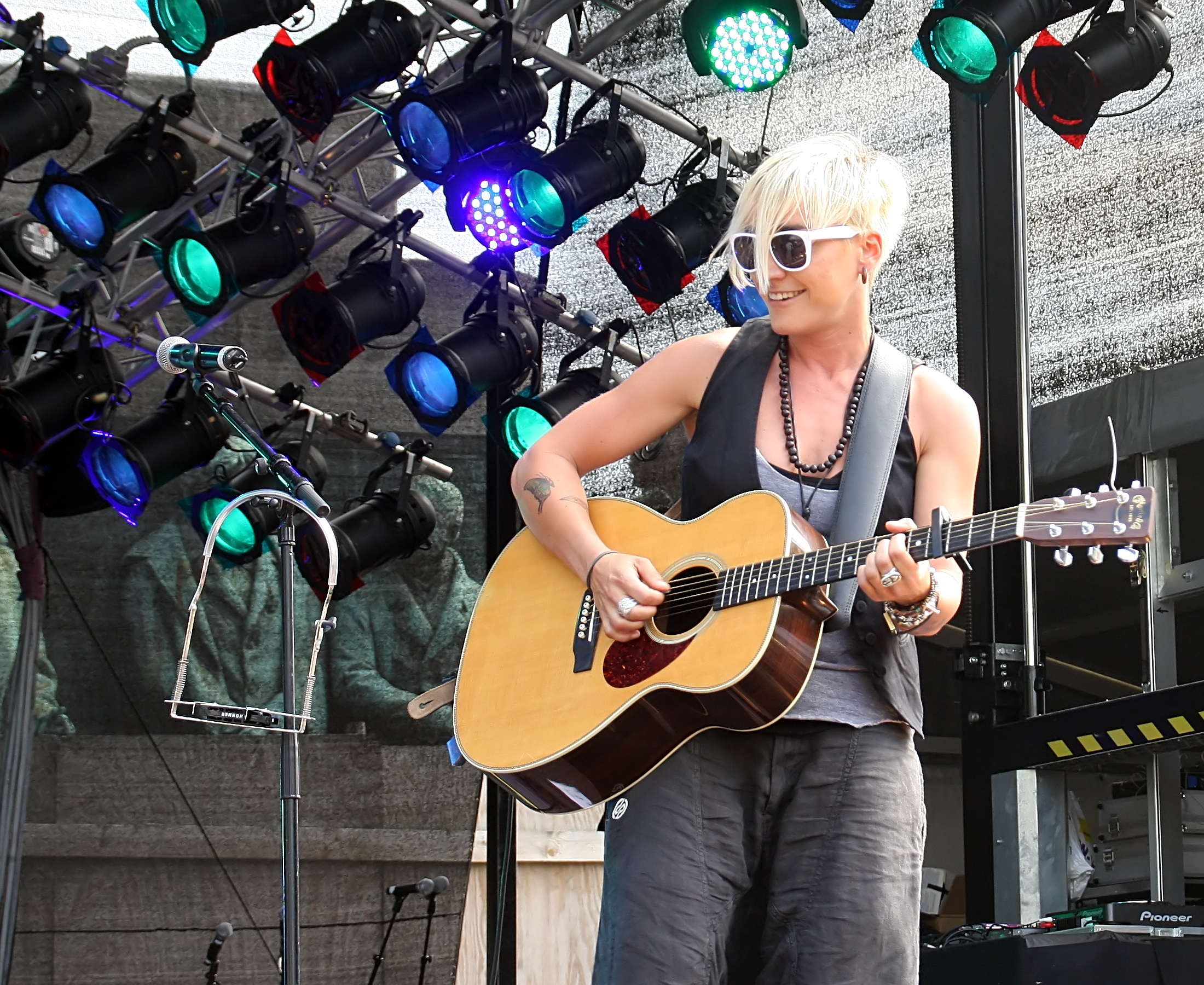 Elli Erl auf der Hauptbühne auf dem Heumarkt, Köln. Bühnenprogramm zum CSD-Straßenfest/ColognePride 2009.